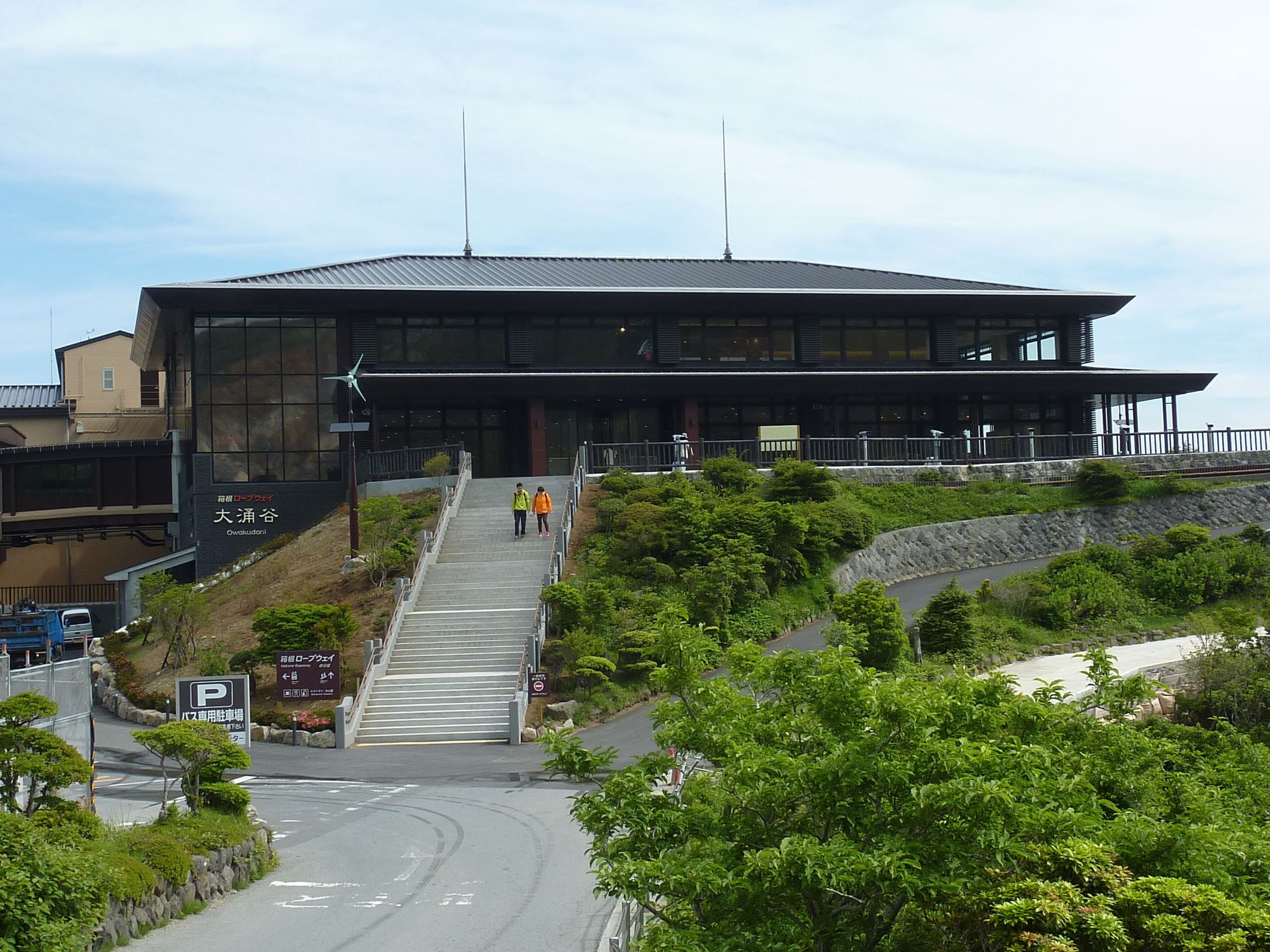 大涌谷駅の新駅舎。2013年6月3日撮影。